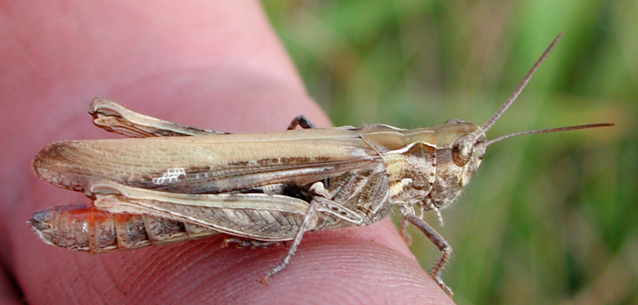 Chorthippus brunneus, f., Brauner Grashüpfer, Weibchen, NSG Kirchwerder Wiesen, Elbmarsch bei Hamburg, Deutschland